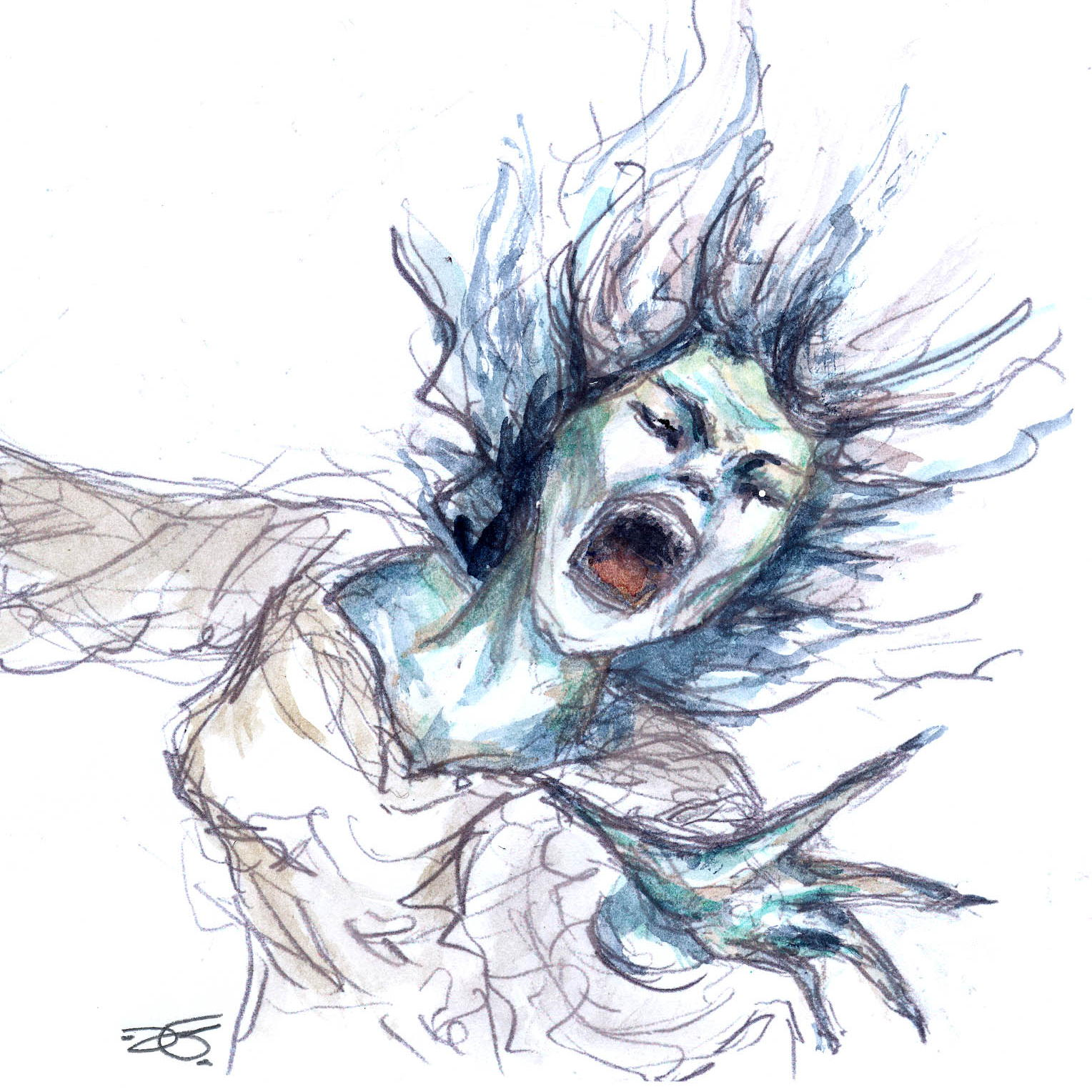 Dessin orginal d'une banshee réalisé par Diane-G